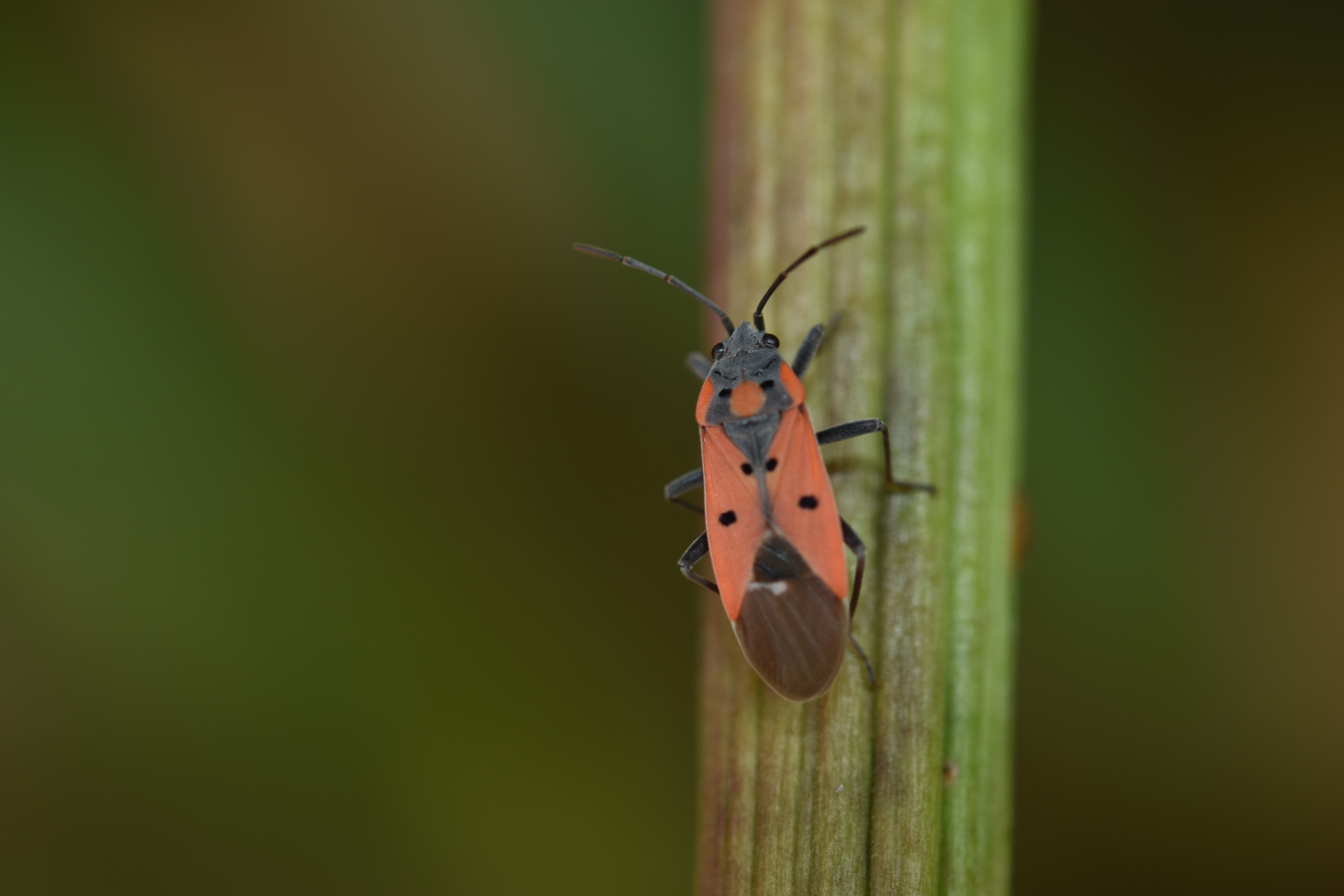 Lygaeus creticus su Nerium oleander